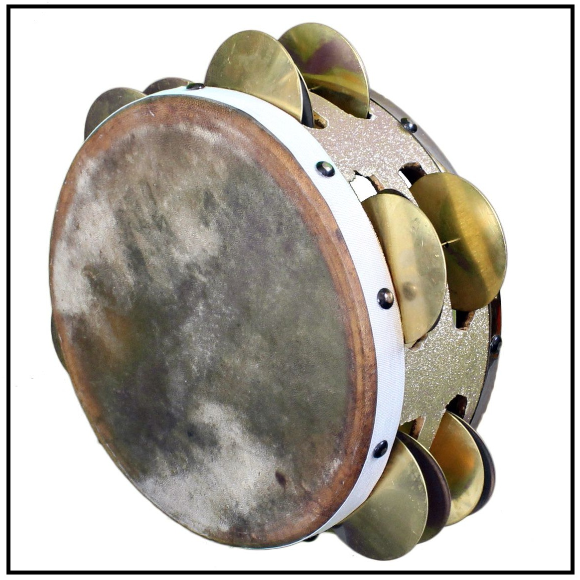 Intrumento de percusion membranofono Egipcio